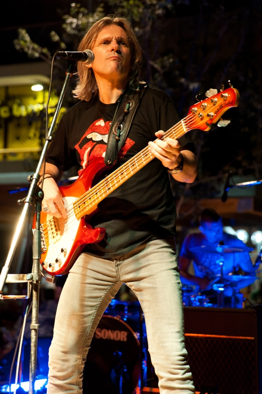 Aerodrom Tomislav Šojat